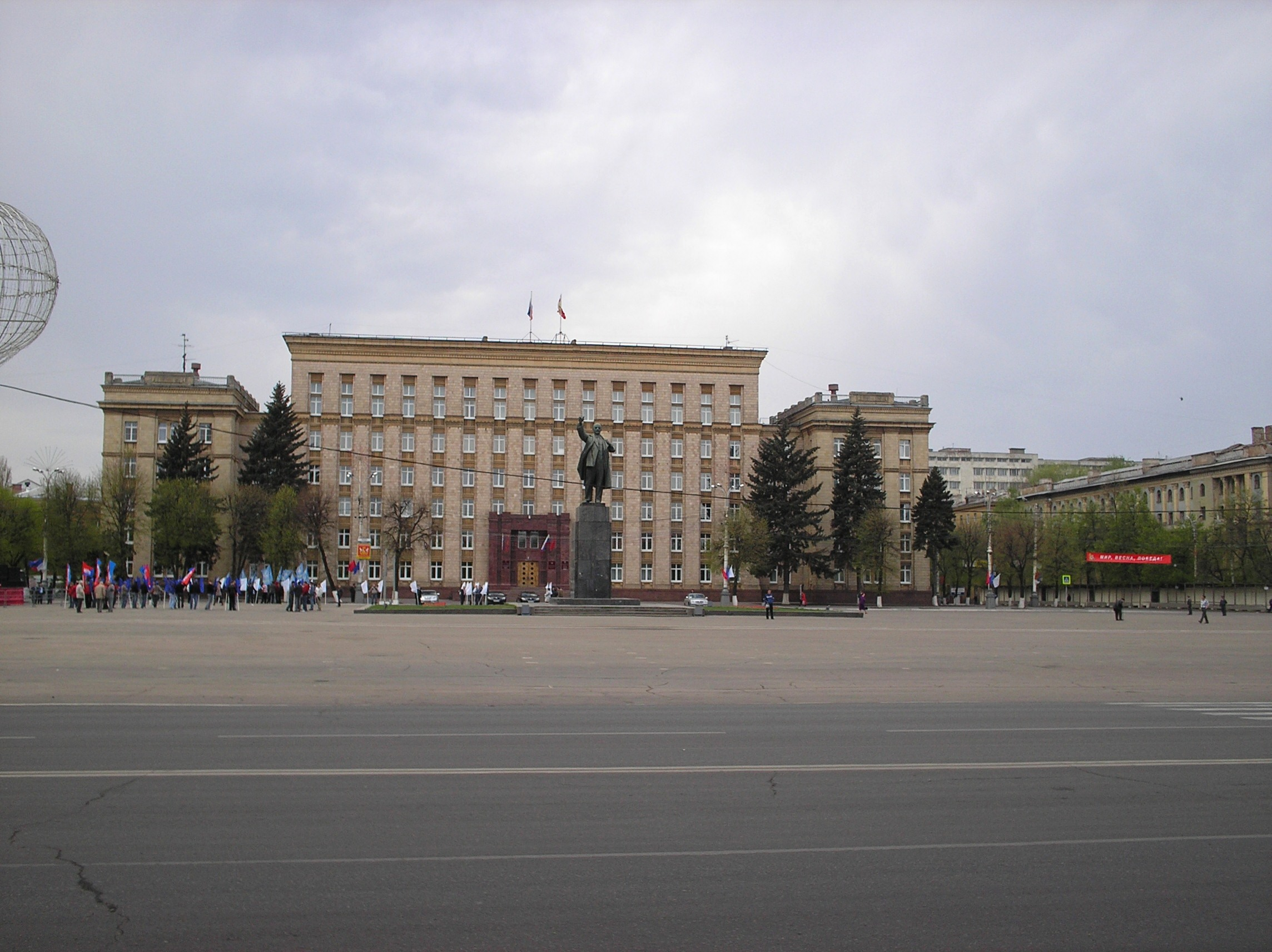 Здание администрации Воронежской области и памятник В. И. Ленину на площади Ленина в Воронеже